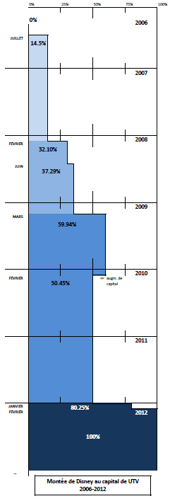 Historique de la participation de Disney dans UTV